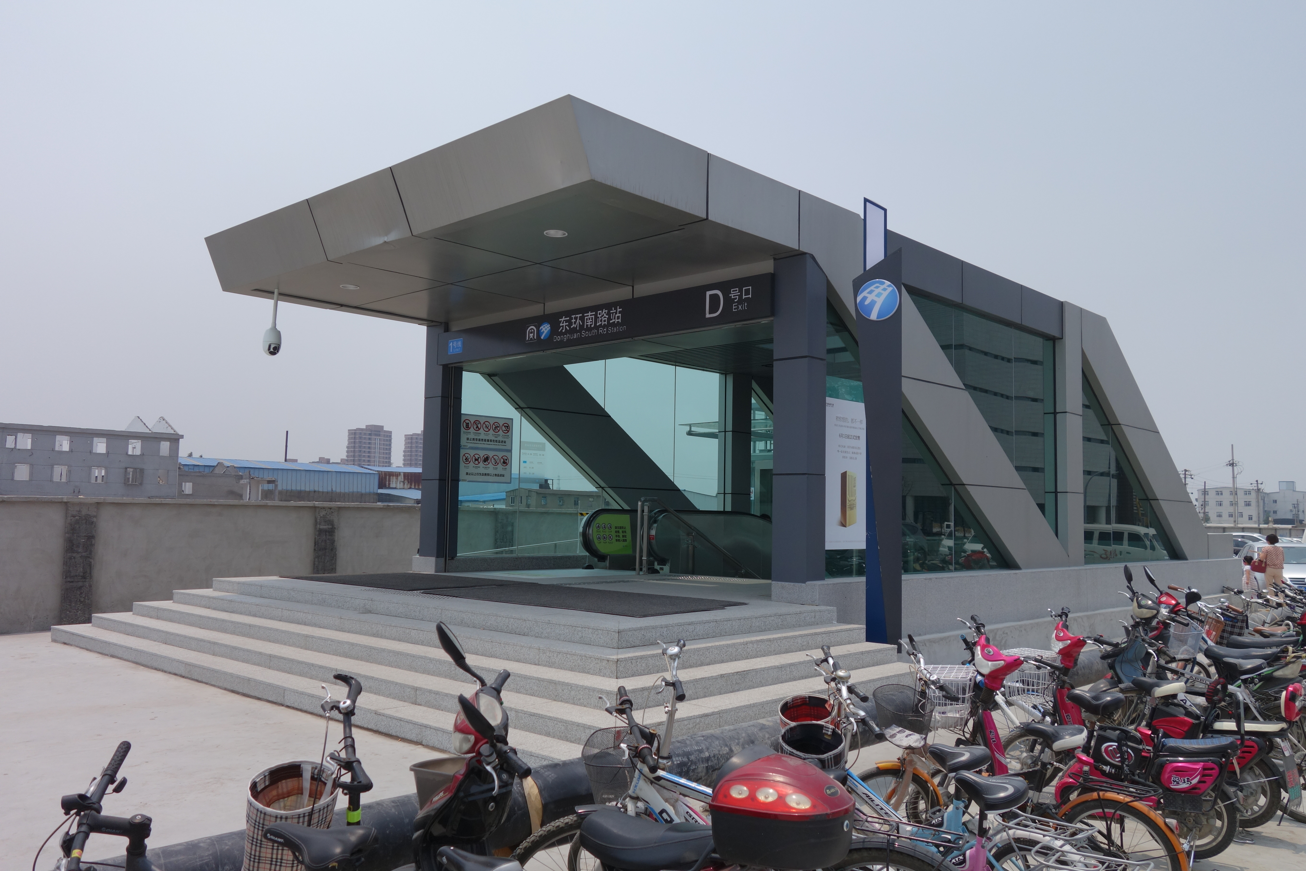 东环南路站D口